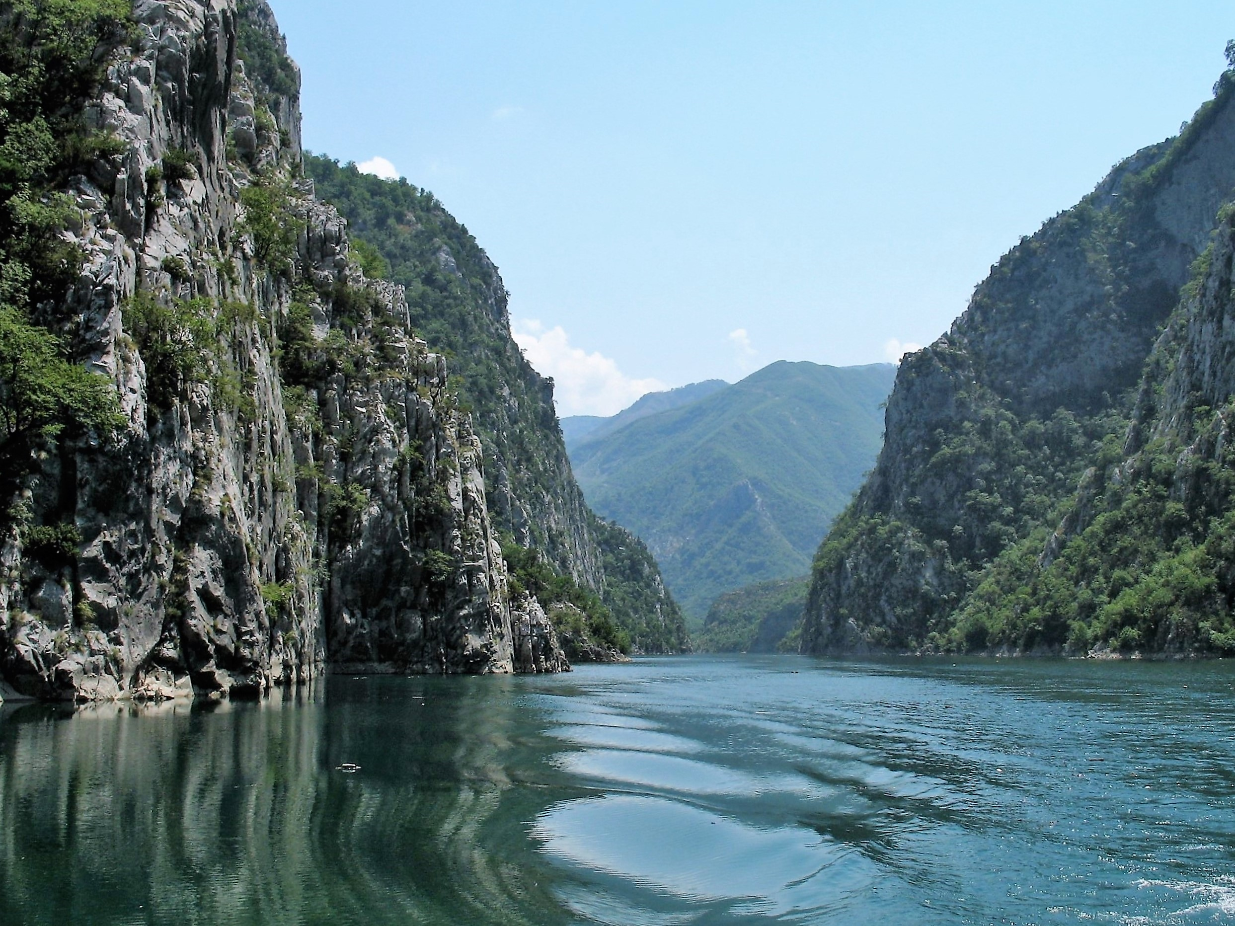 Jeze Komani - soutěska na řece Drinu